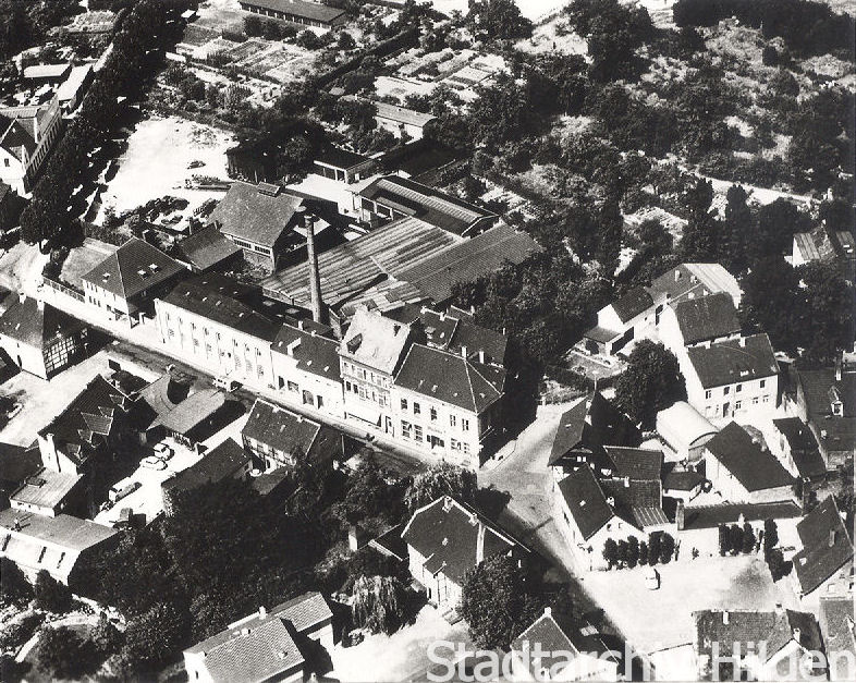 schwarz-weiße Luftaufnahme Hilden: Schwanenstraße u. Nové-Město-Platz im Jahr 1951